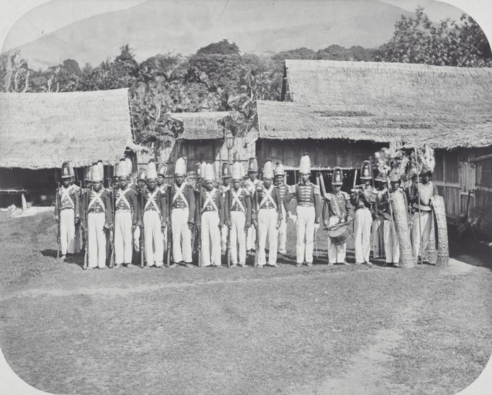 Foto. Sinds het begin van de 16e eeuw hadden de Sultan van Ternate en de Portugezen belangen die grotendeels samenvielen. Halverwege de eeuw doken er echter steeds meer problemen op, vooral omdat beide partijen hun gezag rond Ambon wilden uitbreiden. Daar had de teelt van kruidnagels zich heen verplaatst. In 1570 brak er openlijk oorlog tussen hen uit die in 1575 in het voordeel van Ternate beslecht werd. Na 1600 kwam Ternate langzaam maar zeker onder het gezag van de VOC, wat in 1683 geformaliseerd werd. Gebruiken aan het hof weerspiegelden nog eeuwen later vroegere Europese invloeden. (P. Boomgaard, 2001). Lijfwacht van de Sultan van Ternate